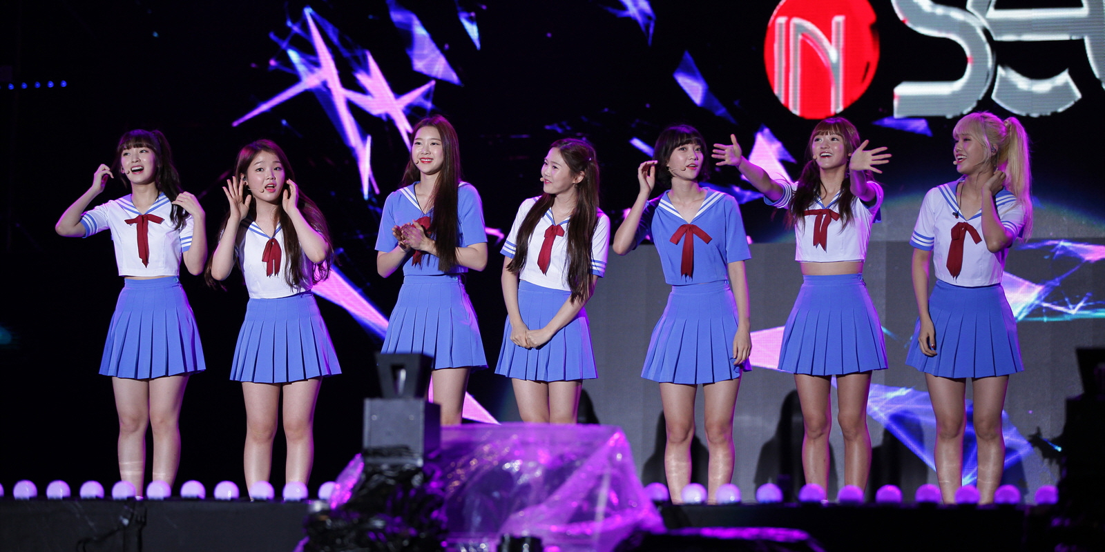 오마이걸(OH MY GIRL) G페스티벌 아시아 드림 콘서트